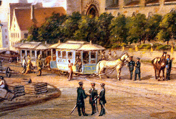 Ingolstadter Pferdebahn, Ausschnitt aus einem Gemälde von Gustav Schröpler